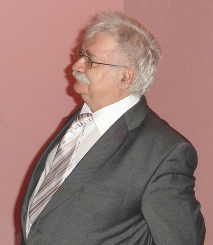 Jerzy Robert Nowak